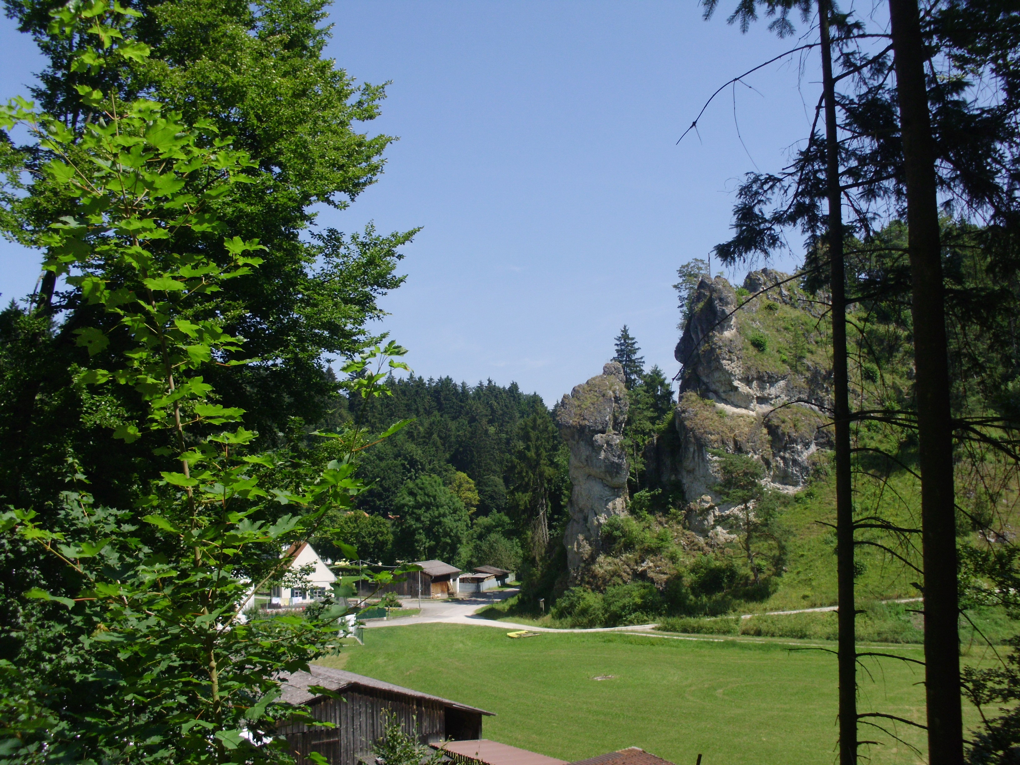 Bachhaupt, Ortsteil von Breitenbrunn im Landkreis Neumarkt in der Oberpfalz